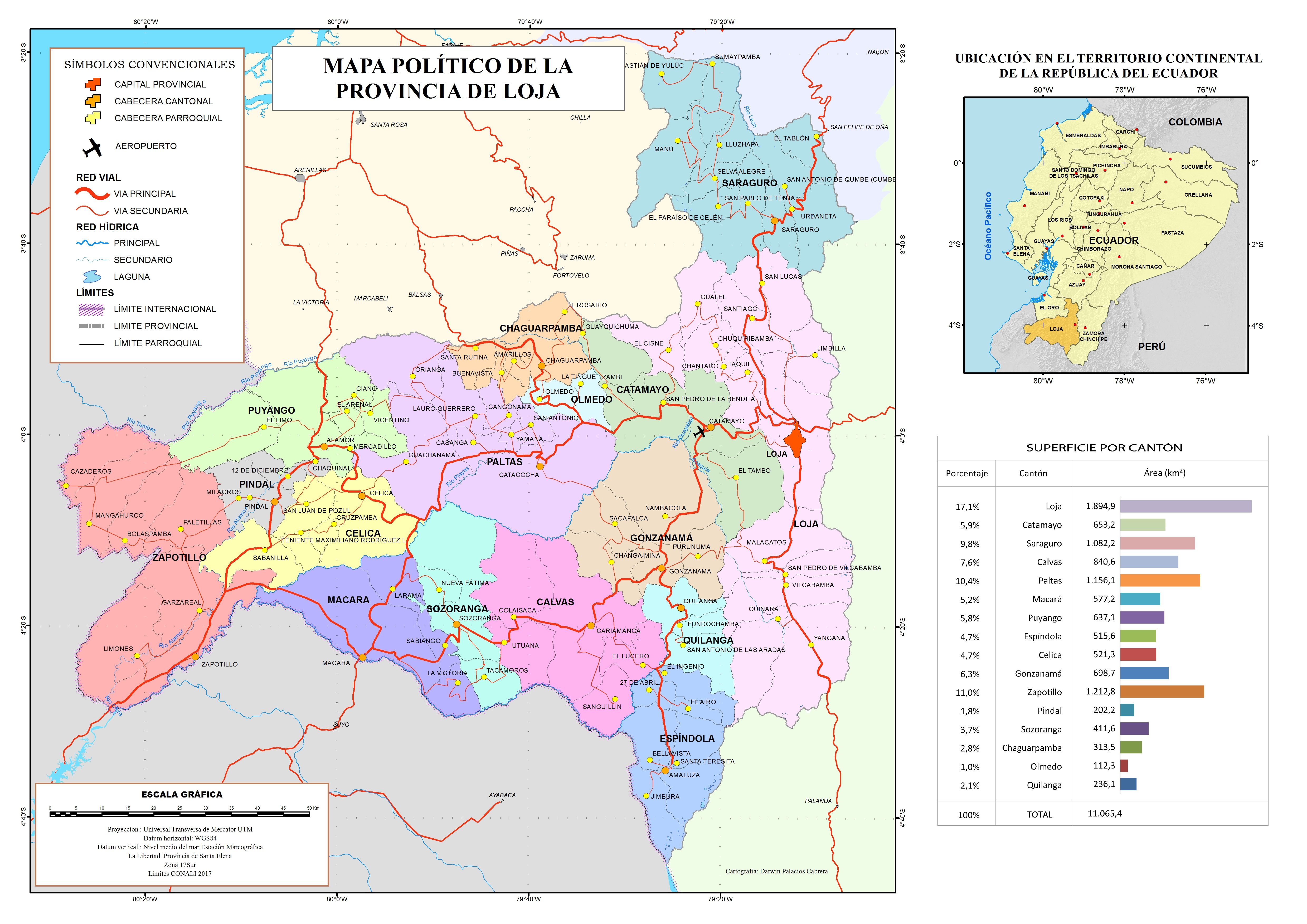 Mapa de la división cantonal y parroquial de la provincia de Loja